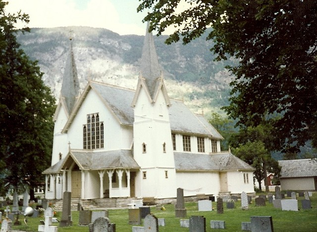 Hauge kirke